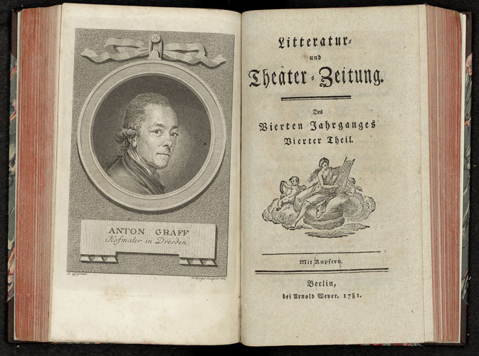 Anton Graff, Erwähnung in der Literatur und Theater Zeitung, publiziert von Arnold Weber, Berlin